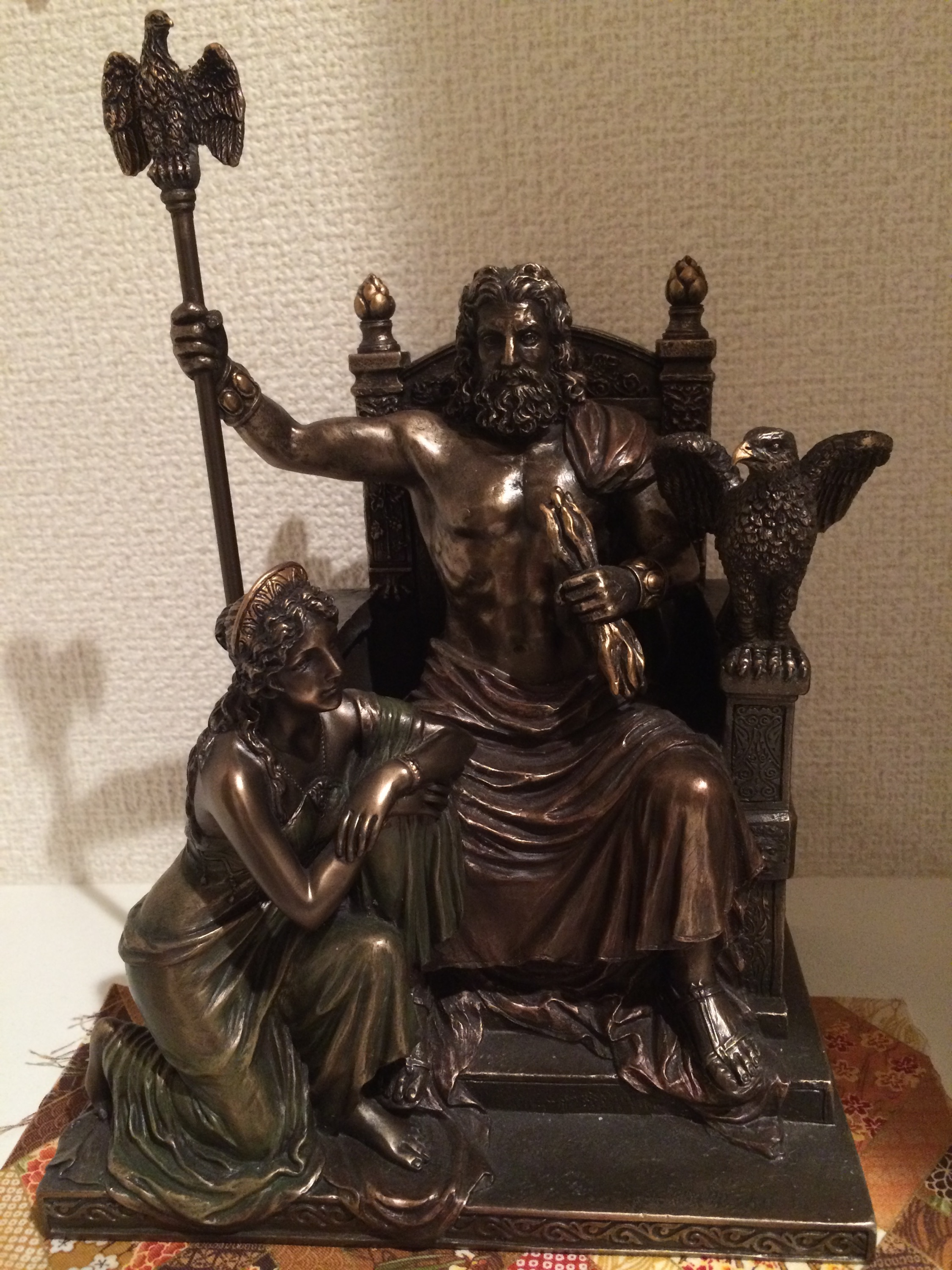 ゼウスとヘーラー像